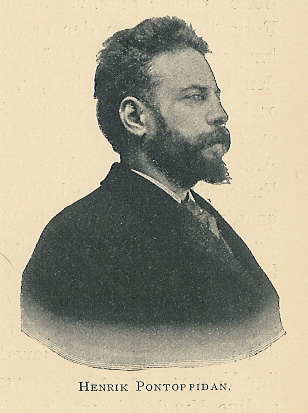 Fotografi af Henrik Pontoppidan.